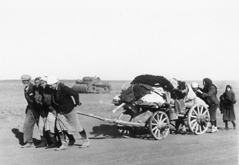 Scherl; An der Sowjetfront: Auf dem Wege ins Flüchtlingslager - Mit dem ihnen verbliebenem Panjewagen bringt eine Familie ihre gerettete habe auf einer der großen Ausfallstraßen Stalingrads in Sicherheit. PK-Aufnahme: Kriegsberichter Gehrmann (Sch) 5870-42, Oktober 1942